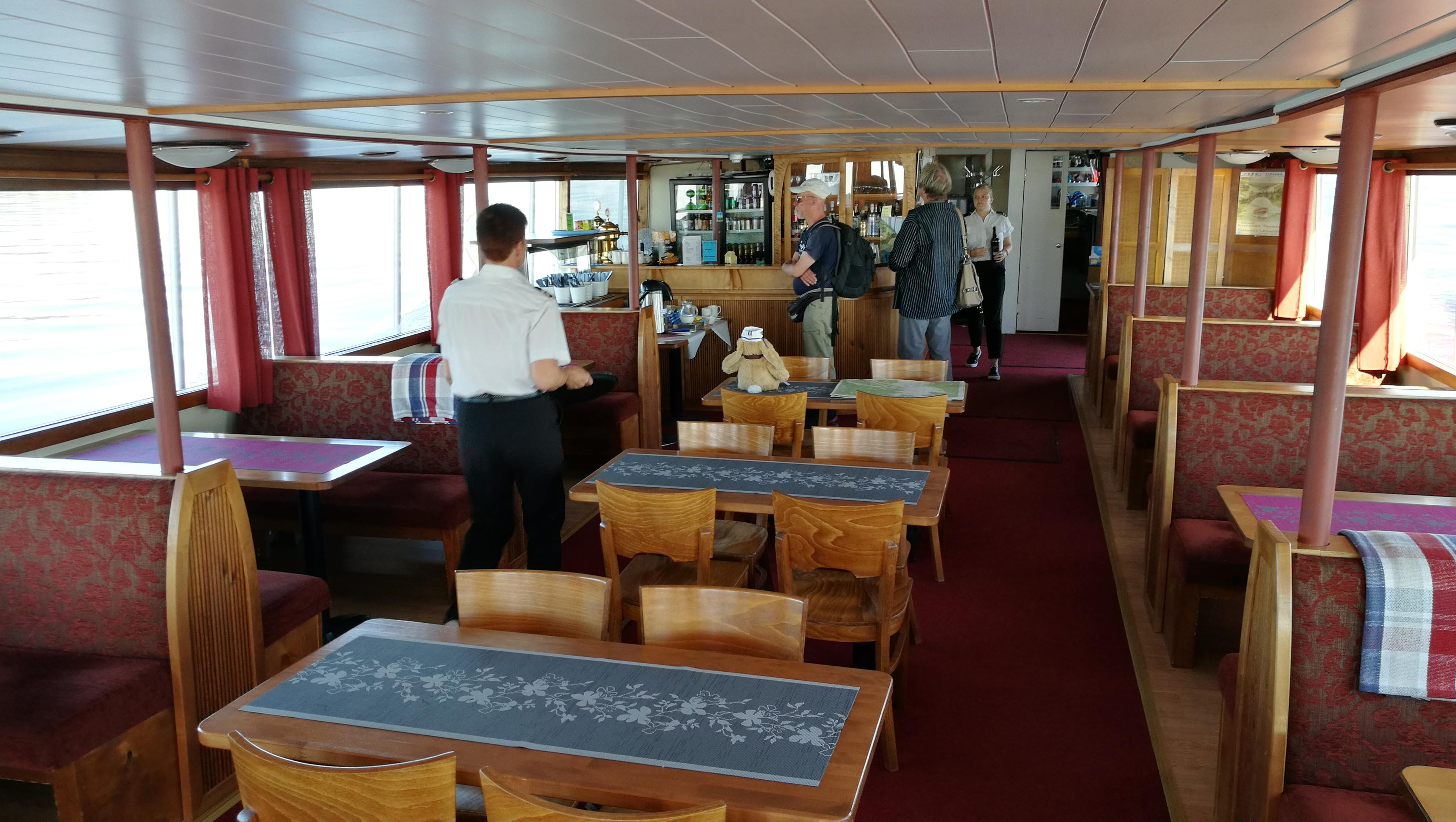 M/S Puijo, ravintolaa, keulasta taakse.